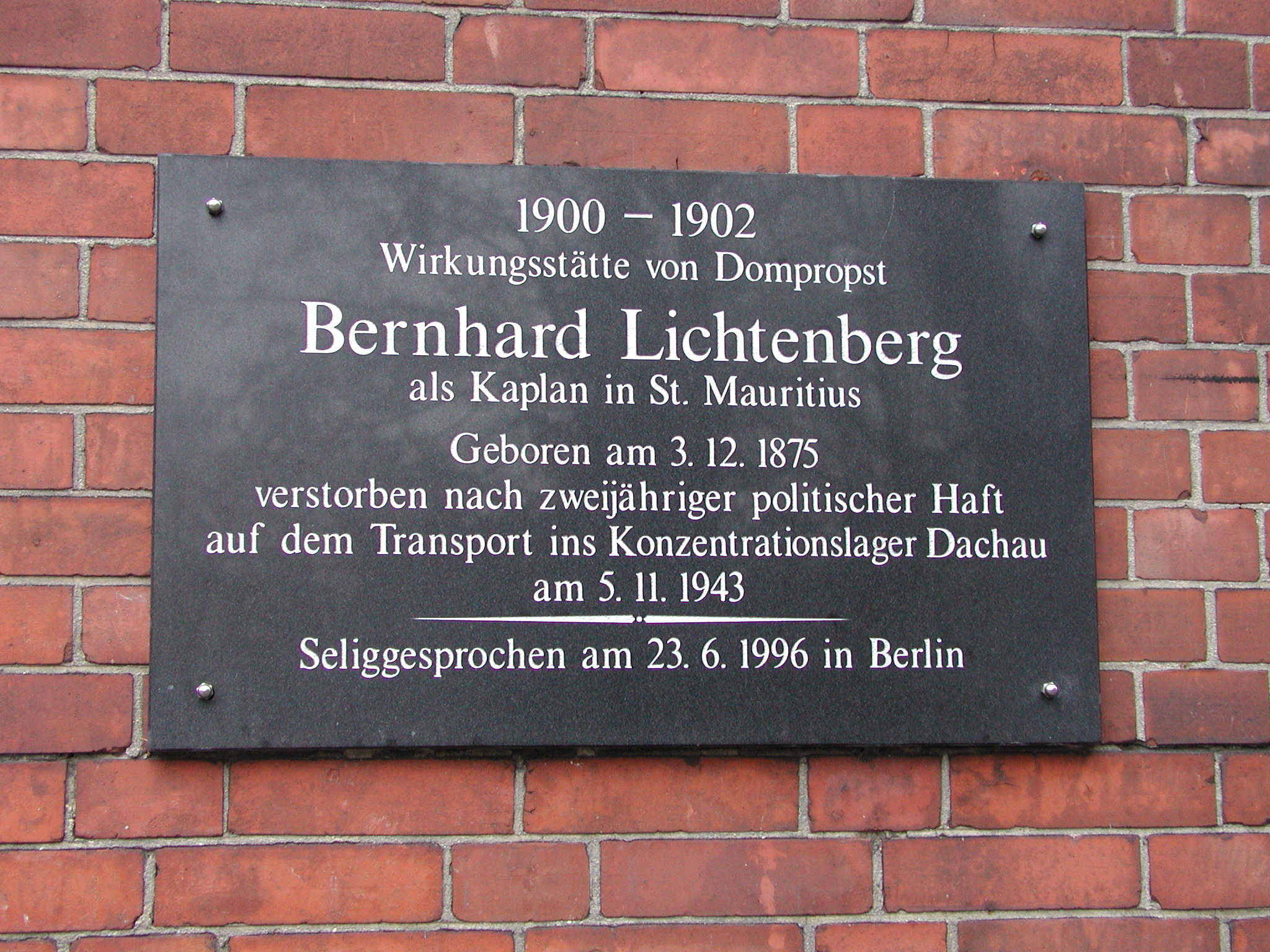 Gedenktafel für den Heiligen Bernhard Lichtenberg an der Mauritiuskirche